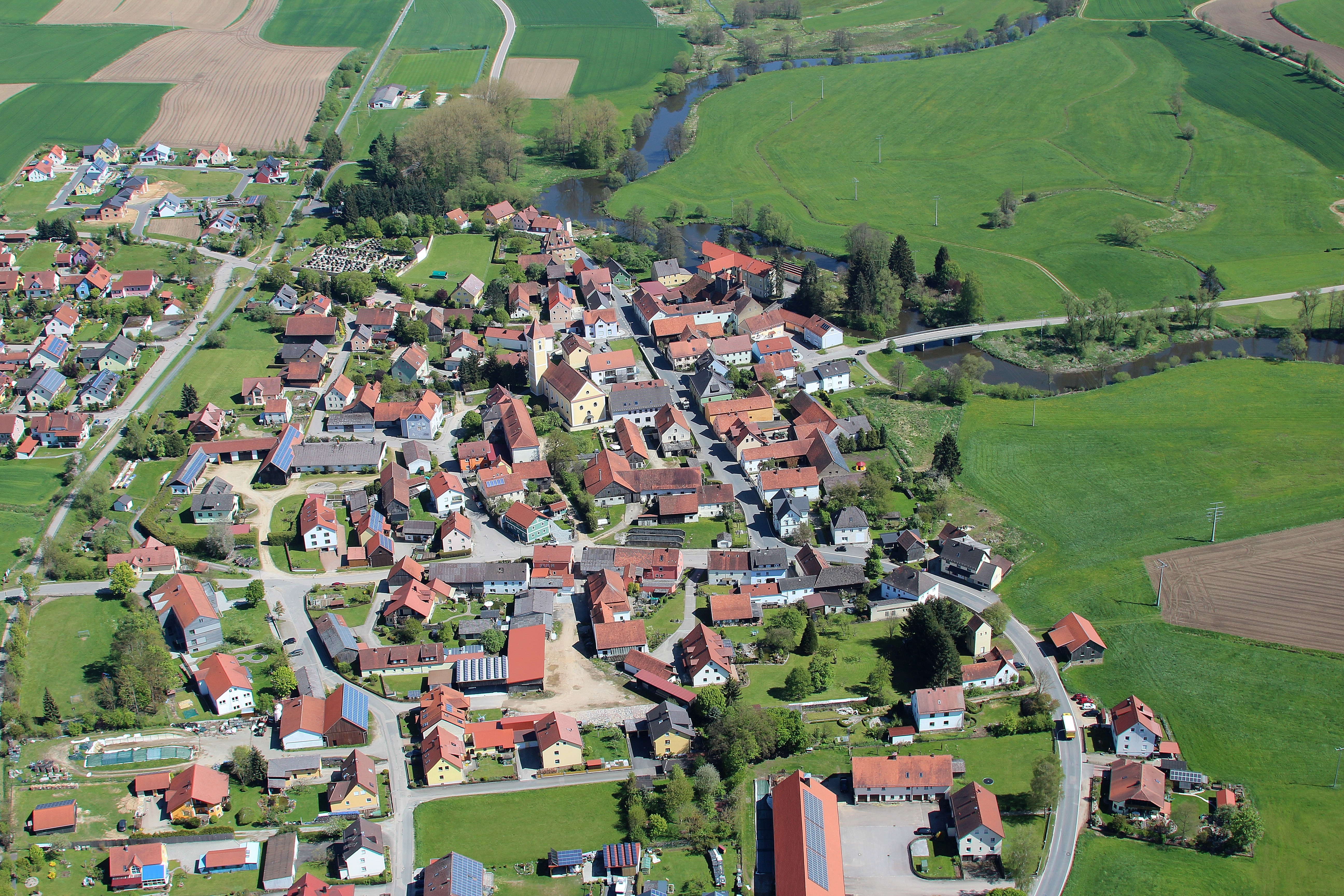 Altendorf, Landkreis Schwandorf, Oberpfalz, Bayern